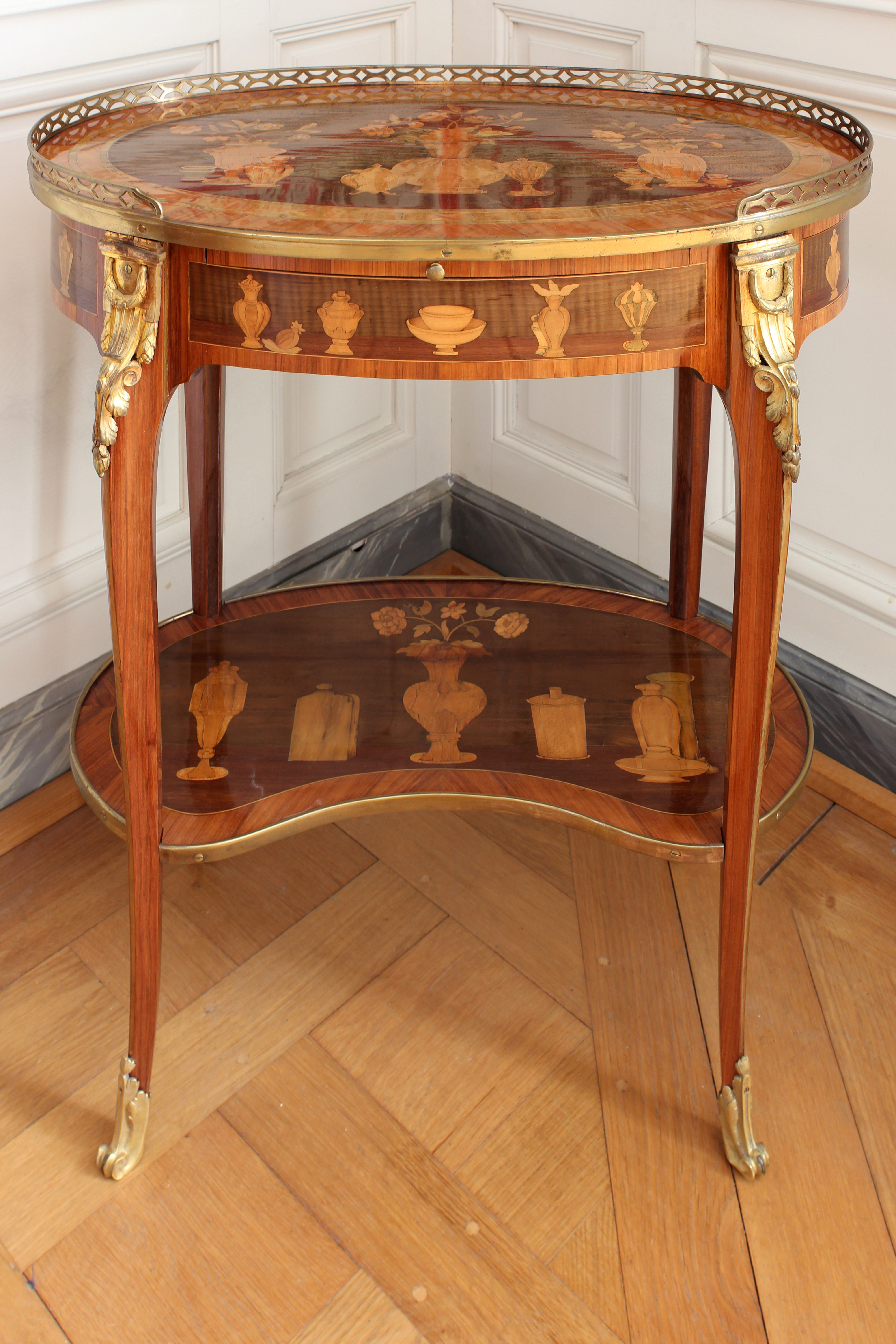 Château de Versailles, petits appartements de la reine (2e étage). Table à écrire ovale, marqueterie de bois divers, avec plateau ovale à galerie de cuivre doré et tablette d'entre-jambes, provenant du service intérieur de Marie-Antoinette à Versailles. Pierre Macret & Charles Topino 1773-1774. (h: 0,745 m, diam: 0,595 m). Numéro d'inventaire : V5752